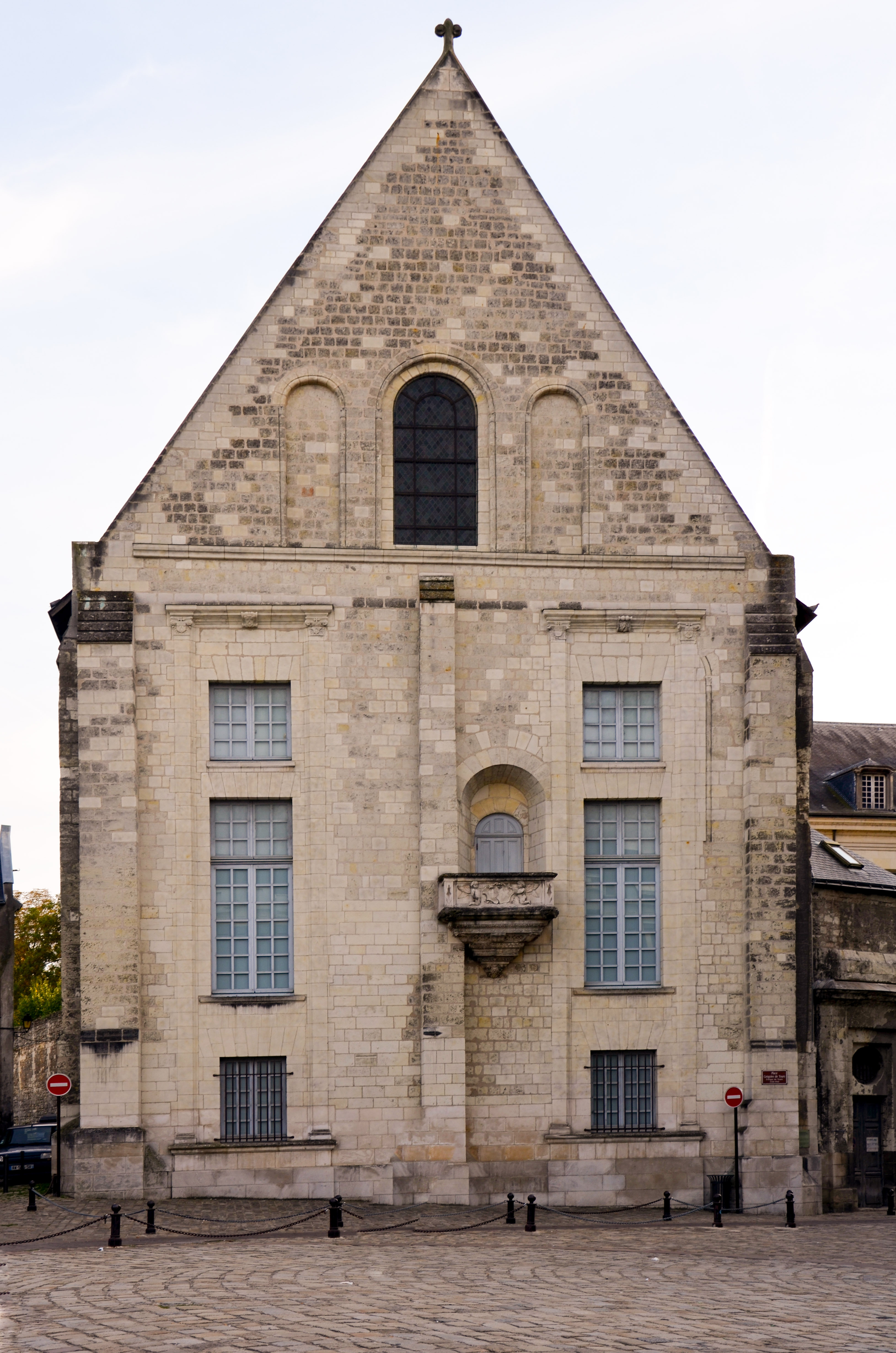 Pignon nord du palais des archevêques à Tours (Indre et Loire, France). Pignon donnant sur la place Grégoire de Tours. Les jugements de la justice de l'évêché étaient donnés en lecture depuis le balcon d'époque Renaissance visible sur cette photo. L'archevêché est aujourd'hui occupé par le musée des Beaux-Arts. .